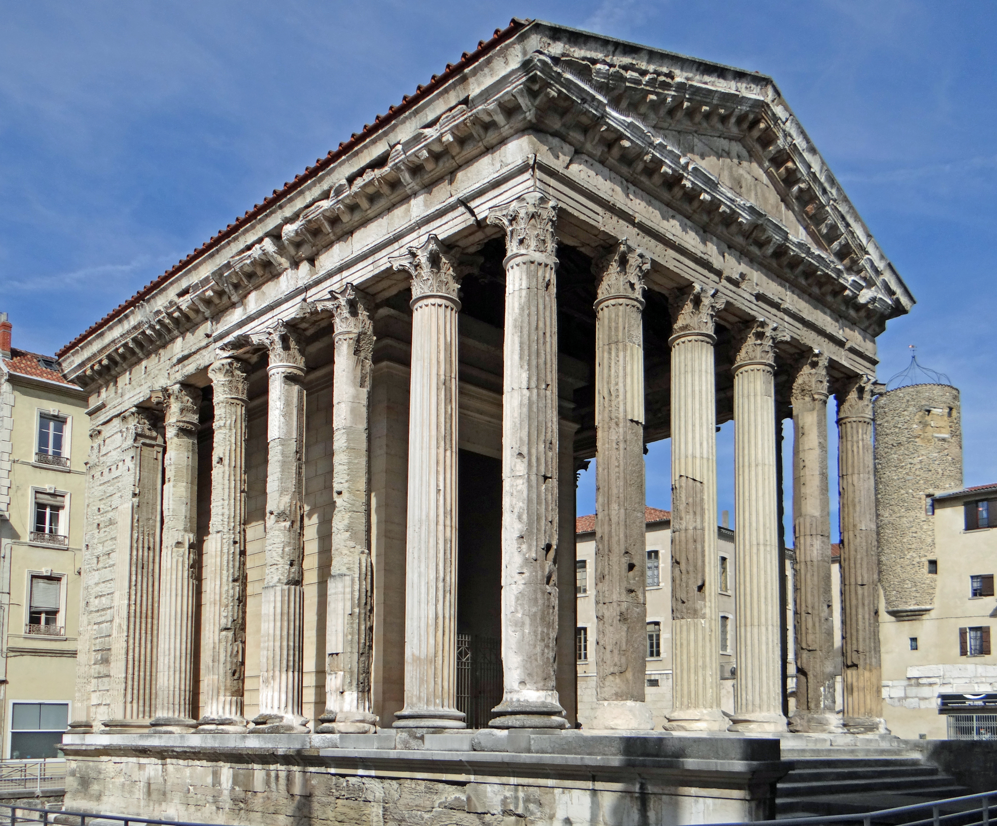 Vienne - Temple d'Auguste et de Livie (sept. 2013)